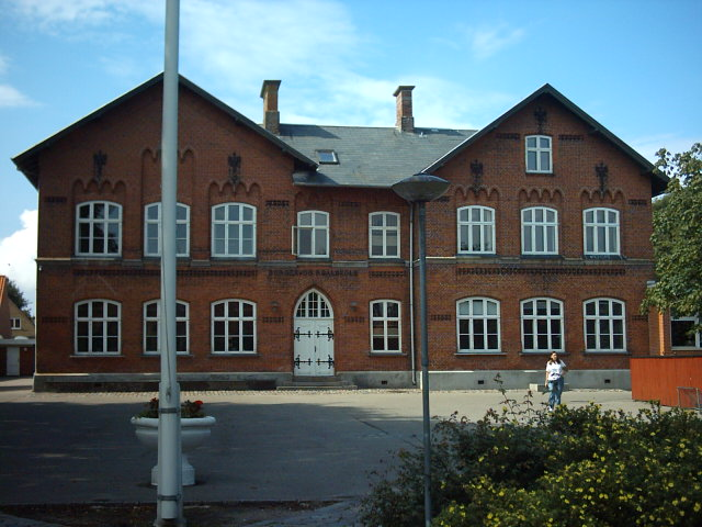 Ærøskøbing Skole